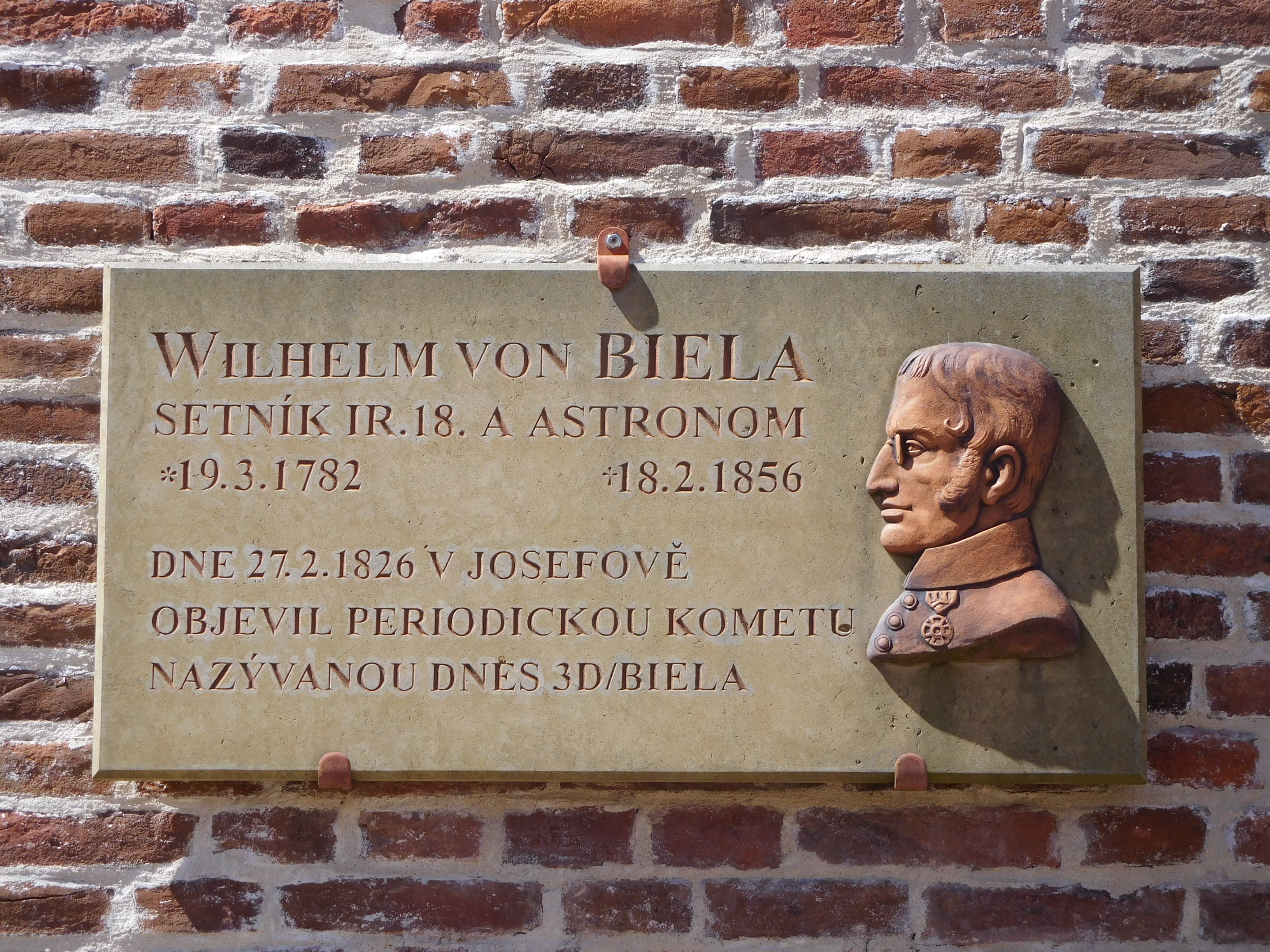 Josefov - Bastion I, pamětní deska Wilhelma von Biely